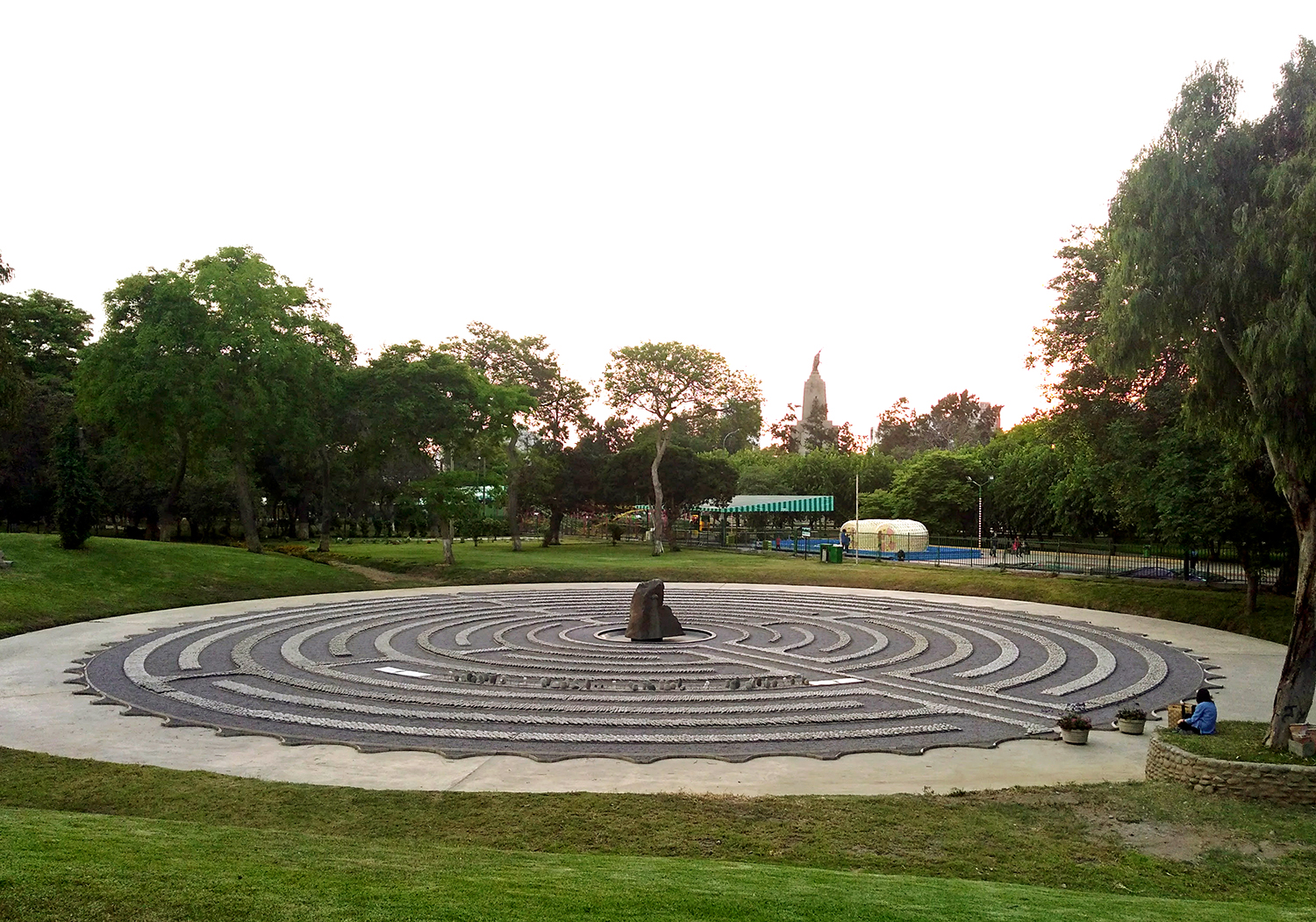 Memorial El ojo que llora, obra de la escultora holandesa radicada en el Perú Lika Mutal, realizado en homenaje a las victimas del conflicto armado interno en el Perú. Este monumento fue declarado patrimonio cultural de la nación por el Ministerio de Cultura del Perú en el año 2013.